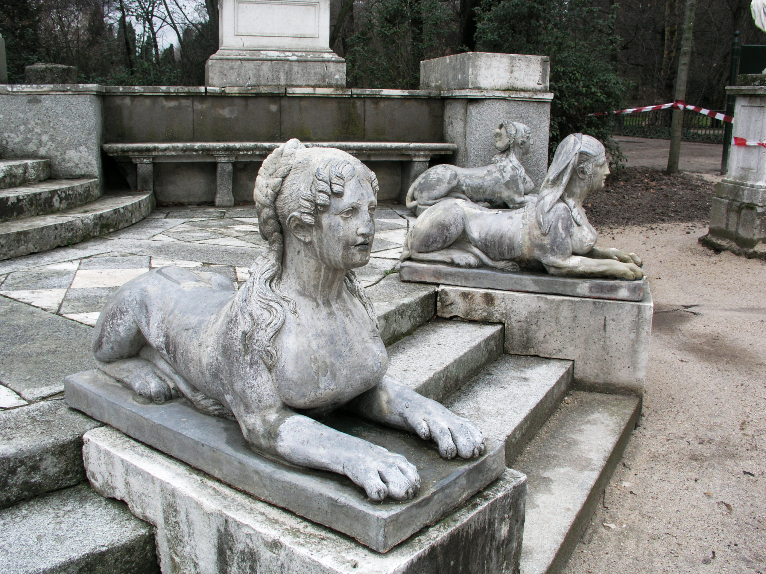 Jardín El Capricho, Madrid, Spain. Sfinxs at Exedra y Plaza de los Emperadores.